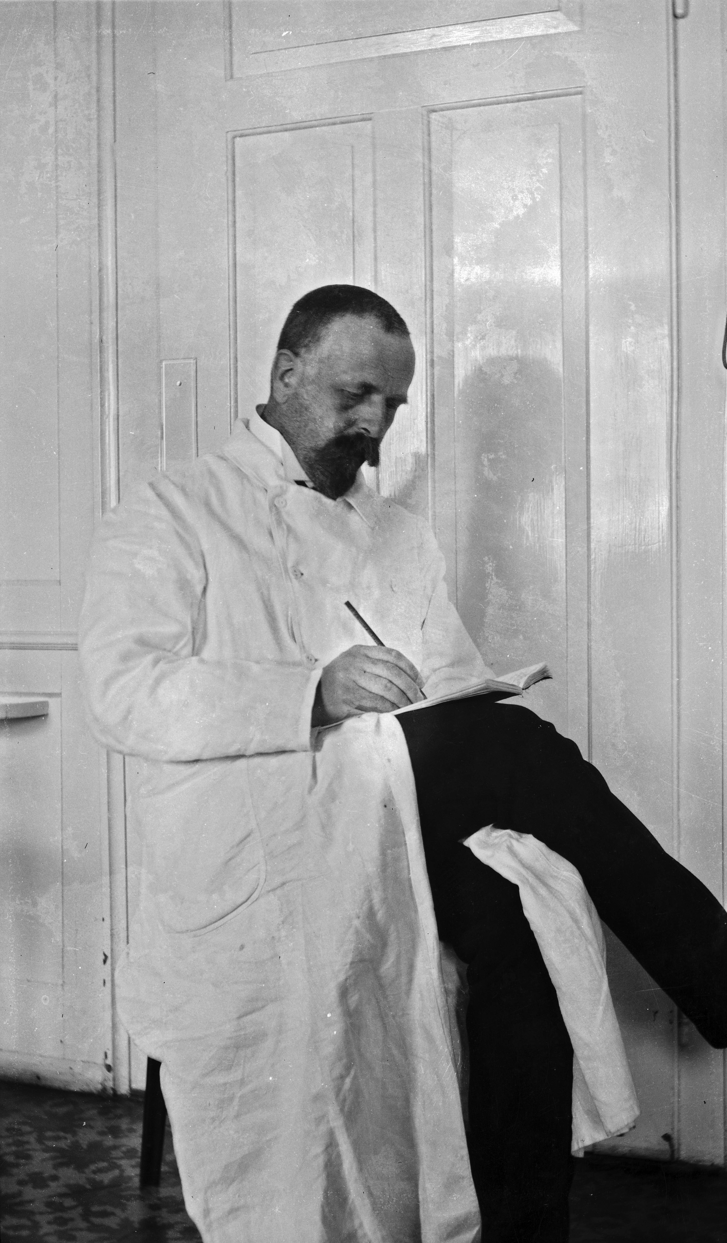 Doktor Ludwig von Muralt. Edith Södergrans samling Signum: slsa566_273 Foto: Edith Södergran Svenska litteratursällskapet i Finland